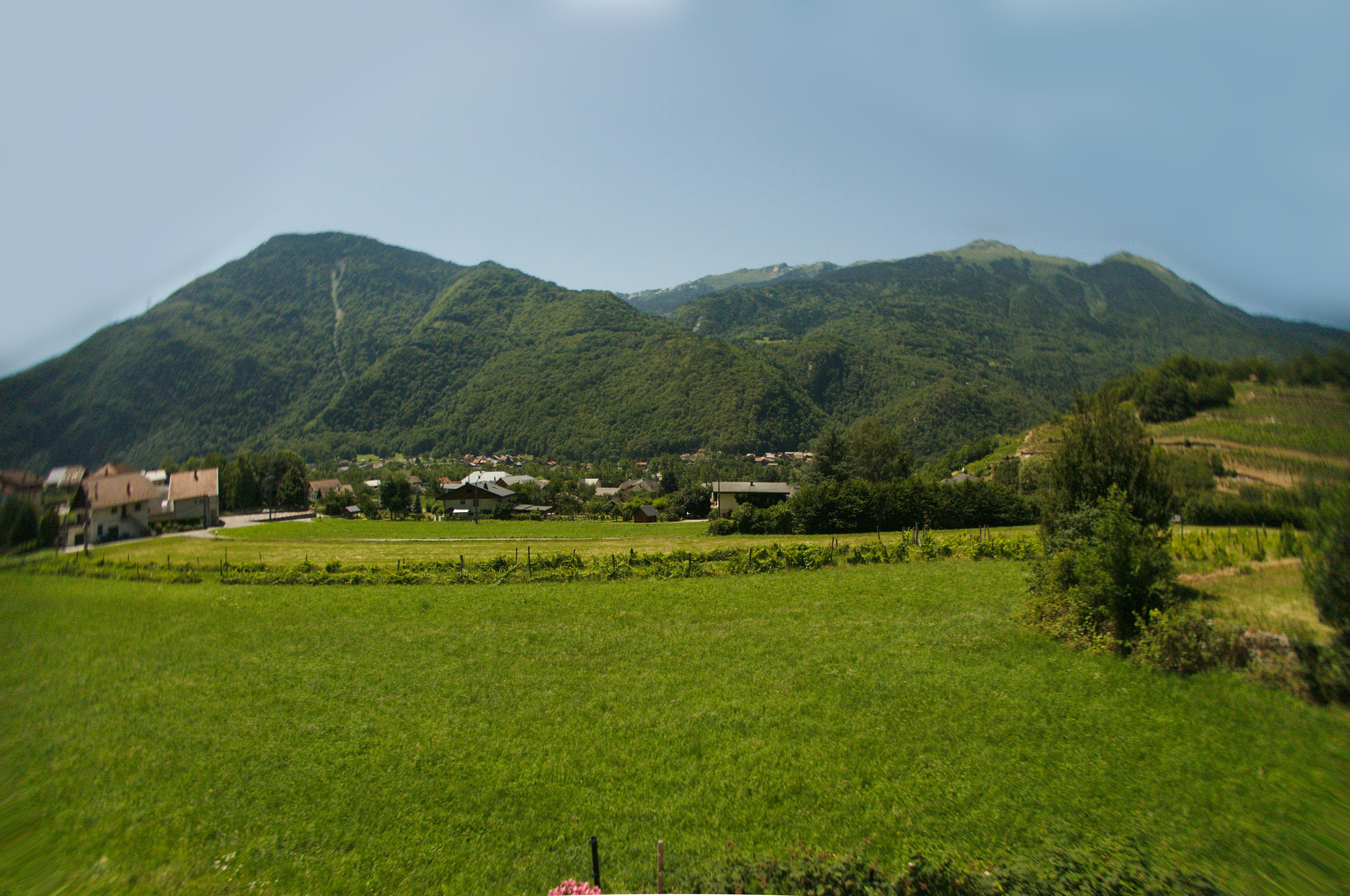 Cevin vu d'une des maisons de Cevins.